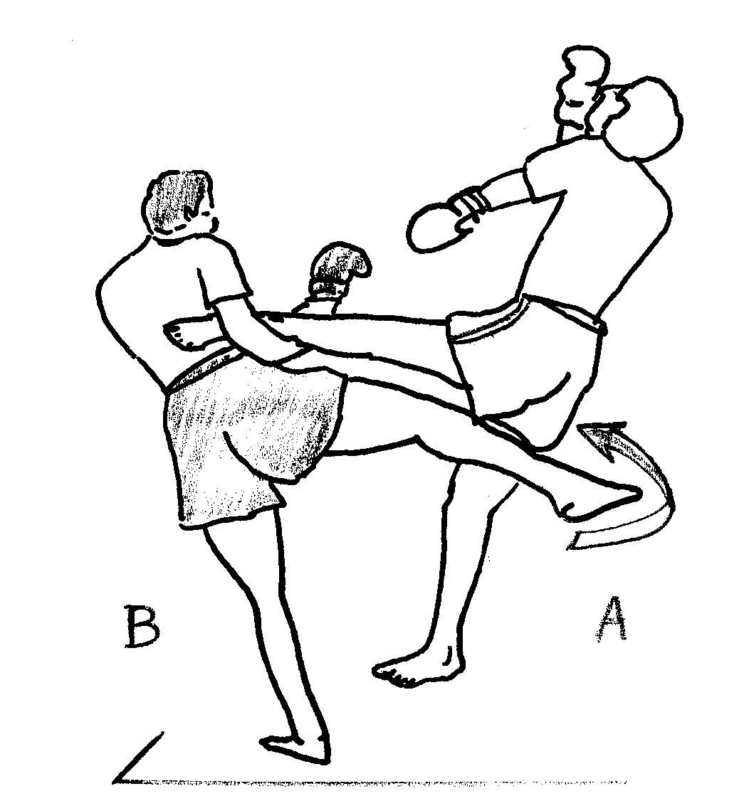 saisie_fauchage.jpg